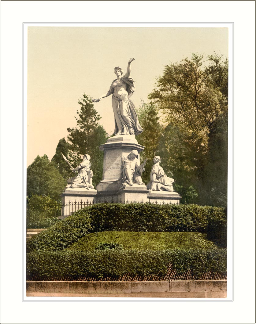 The Monument St. Jacob Basle Switzerland